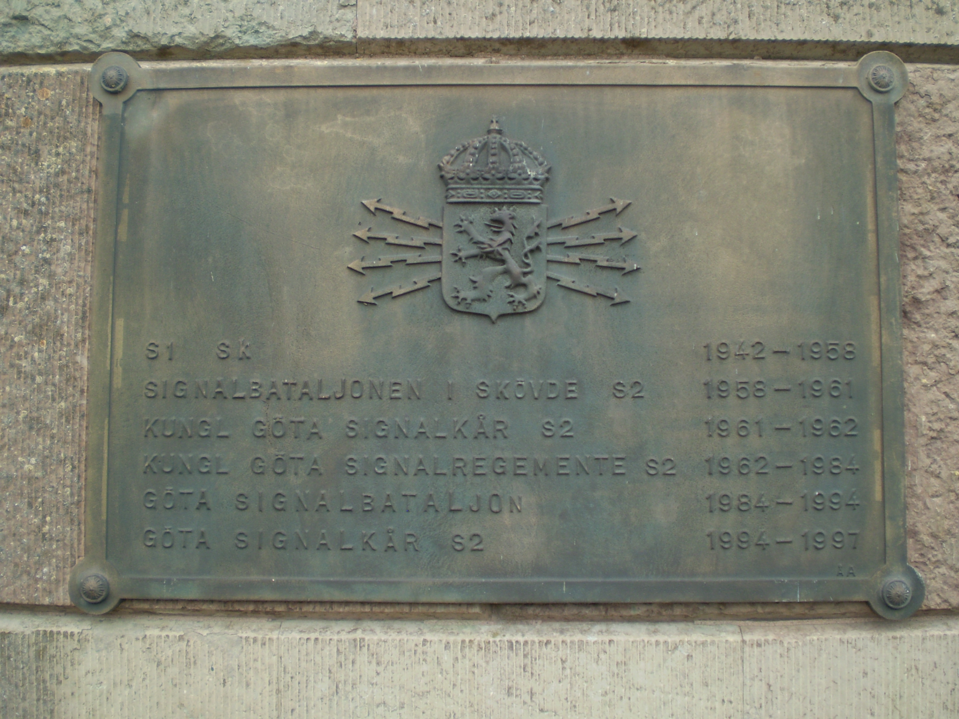 Minnestavla fäst på Fästningskyrkan över Göta signalregementes (S 2) aktiva tid vid Karlsborgs garnison.